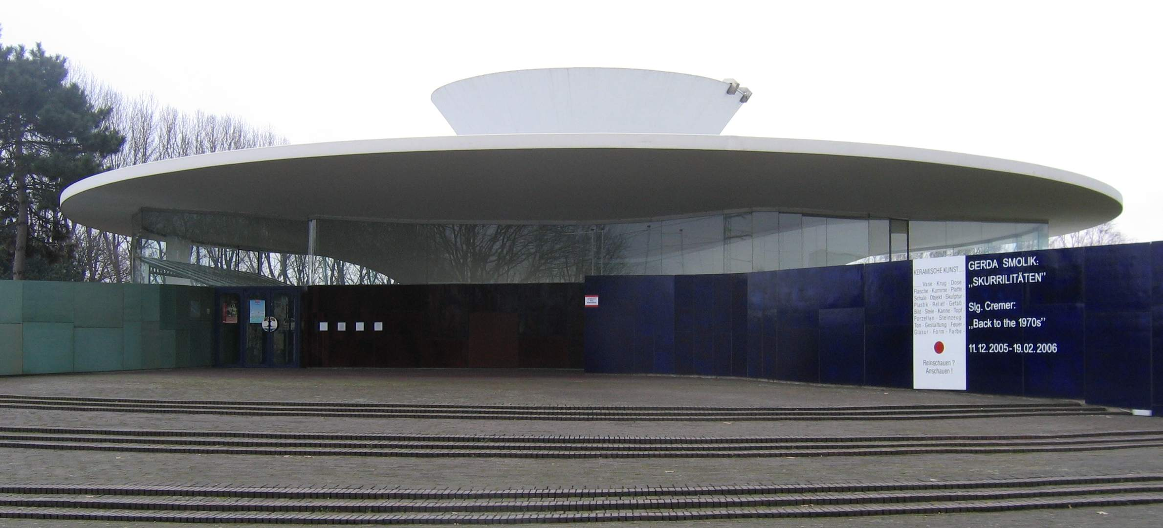 Keramion Frechen